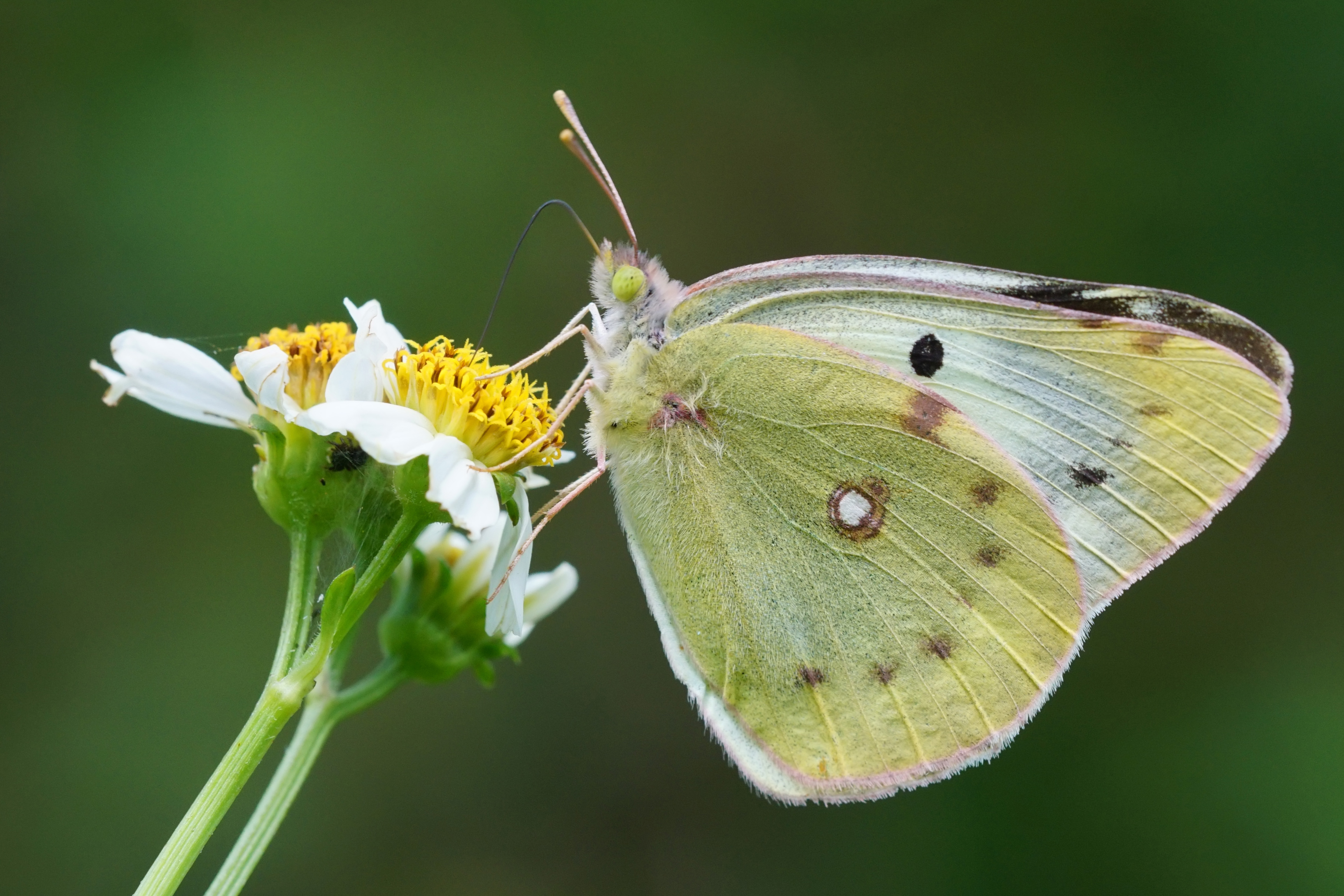 紋黃蝶 Colias erate formosana